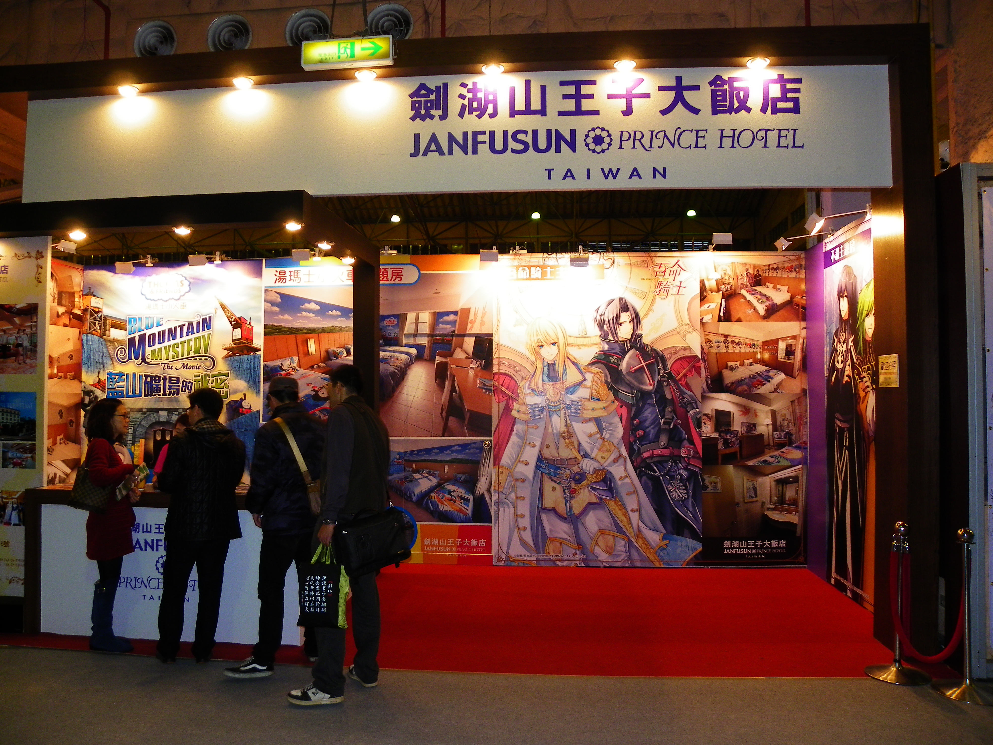 2013年臺北國際書展，世貿二館劍湖山王子大飯店（雲林縣古坑鄉）攤位，主打御我＜吾命騎士＞主題房、湯瑪士小火車主題房。